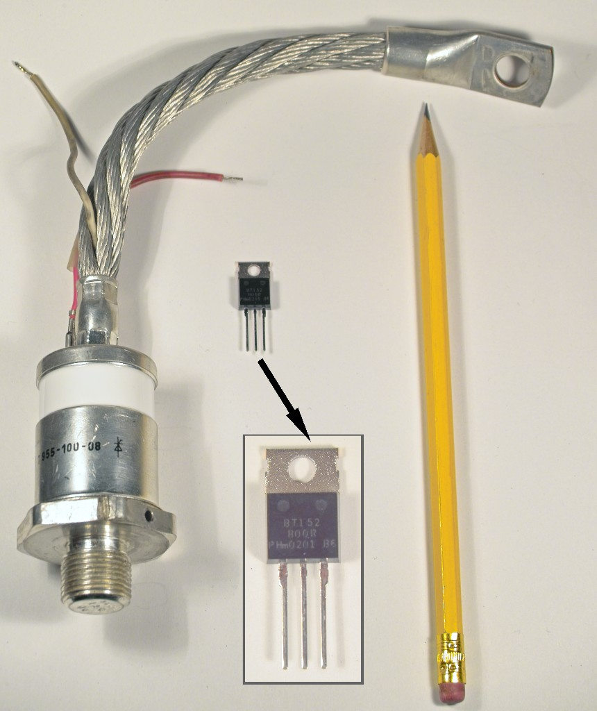 Thyristoren großes Bild: Thyristor 100 Ampère/800 Volt kleines Bild: Thyristor 13 Ampère/800 Volt in Standardgehäuse TO-220 (Bleistift zum Größenvergleich)